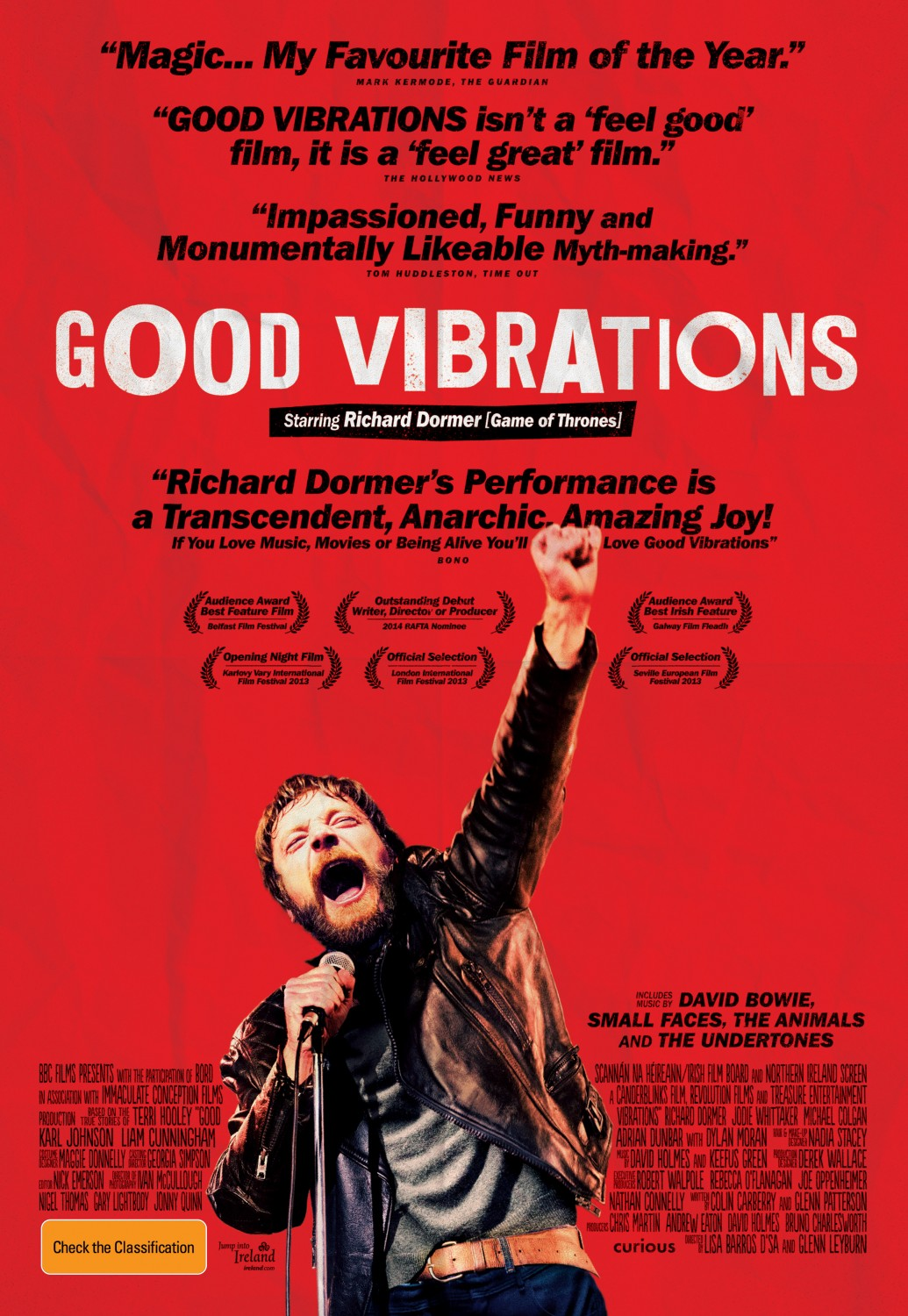 Affiche du film good vibrations